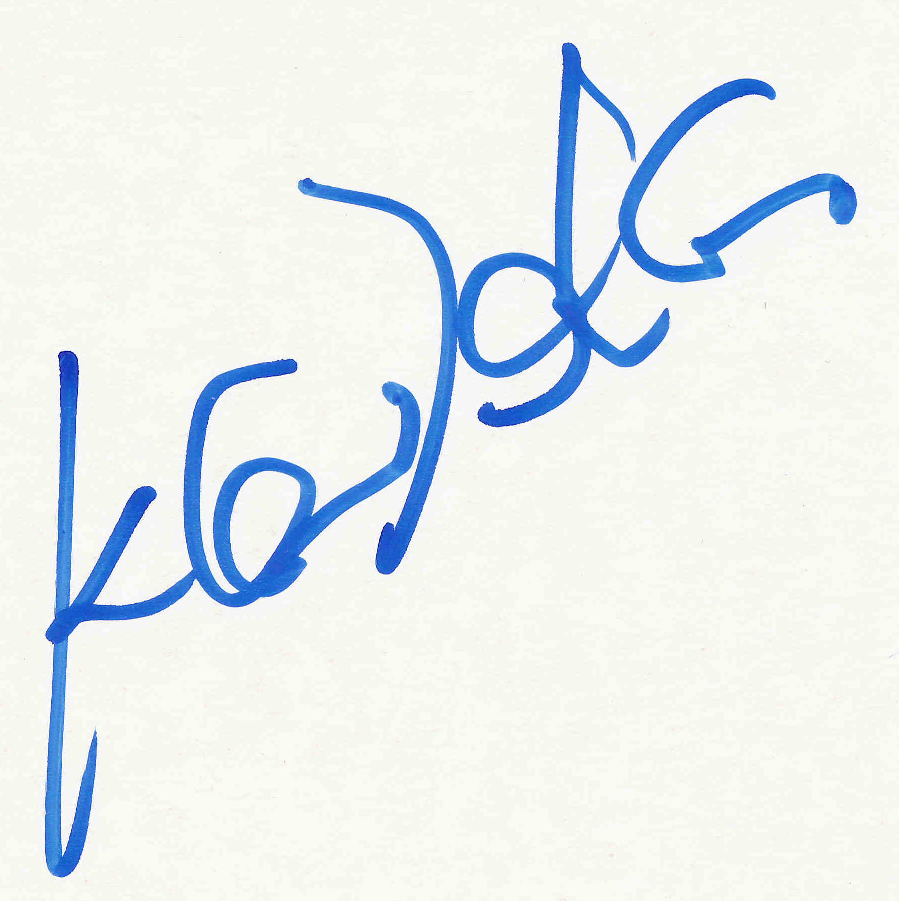 Autogramm von Klaus Dahlen aus der Sammlung von Udo Grimberg